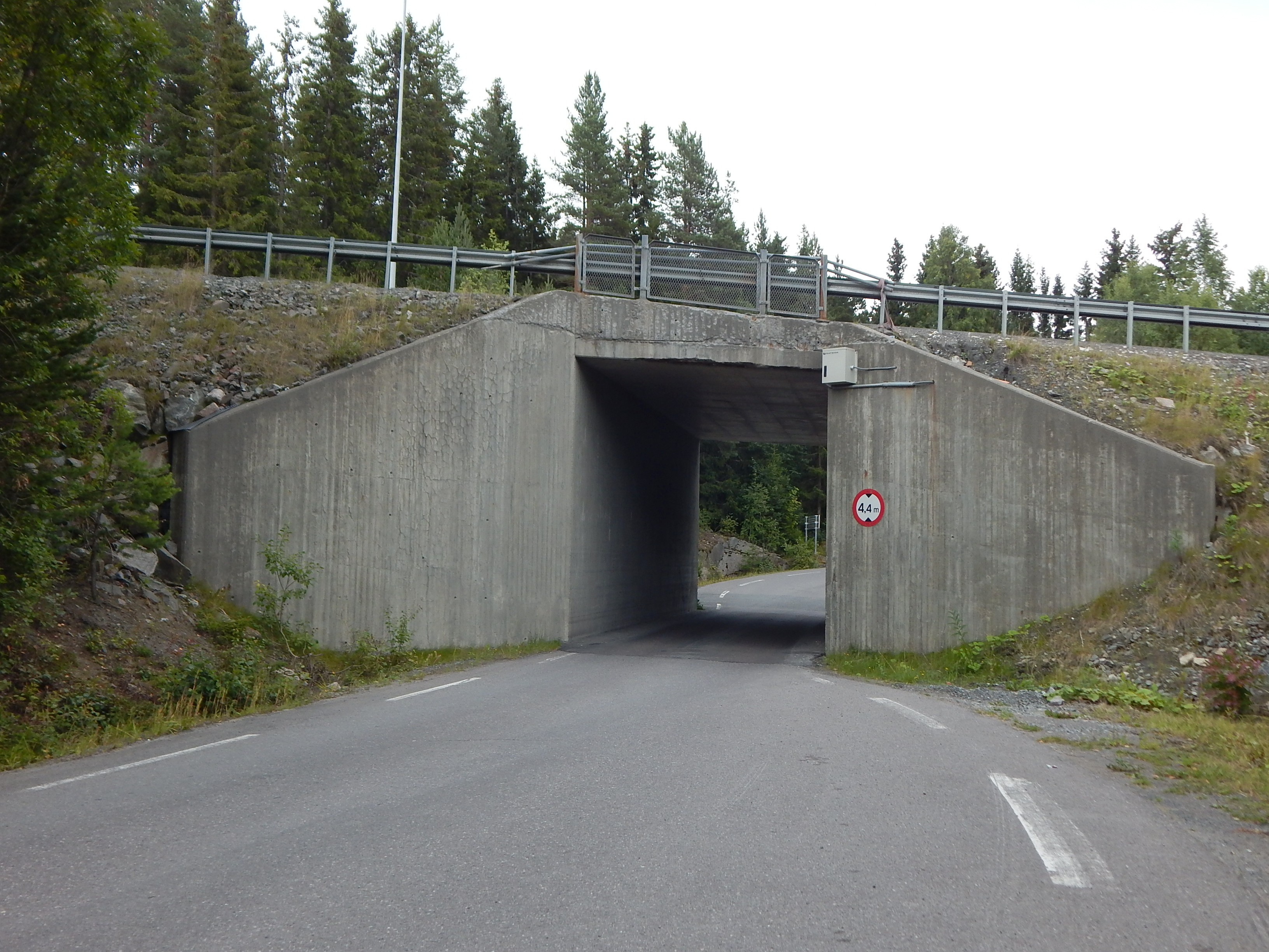 Movegen (fylkesvei 2326, tidl. 52) under riksvei 4